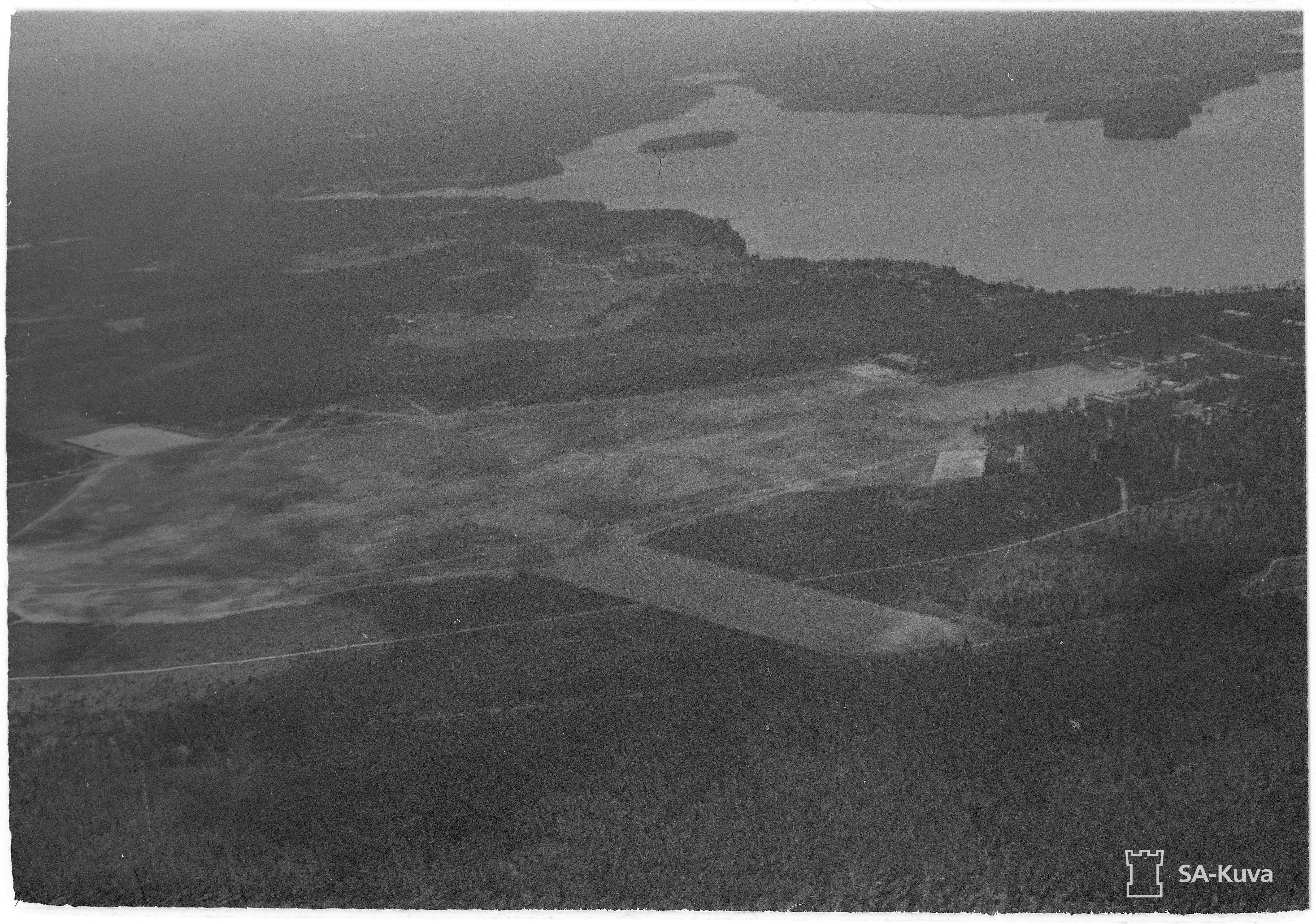 Mensuvaaran lentokenttä ilmasta otettuna. Heinäkuu 1944.